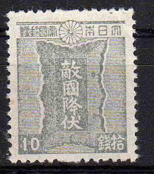 japanese stamp（日本の普通切手）